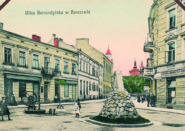 Widok ul bernardyńskiej z 1912 roku